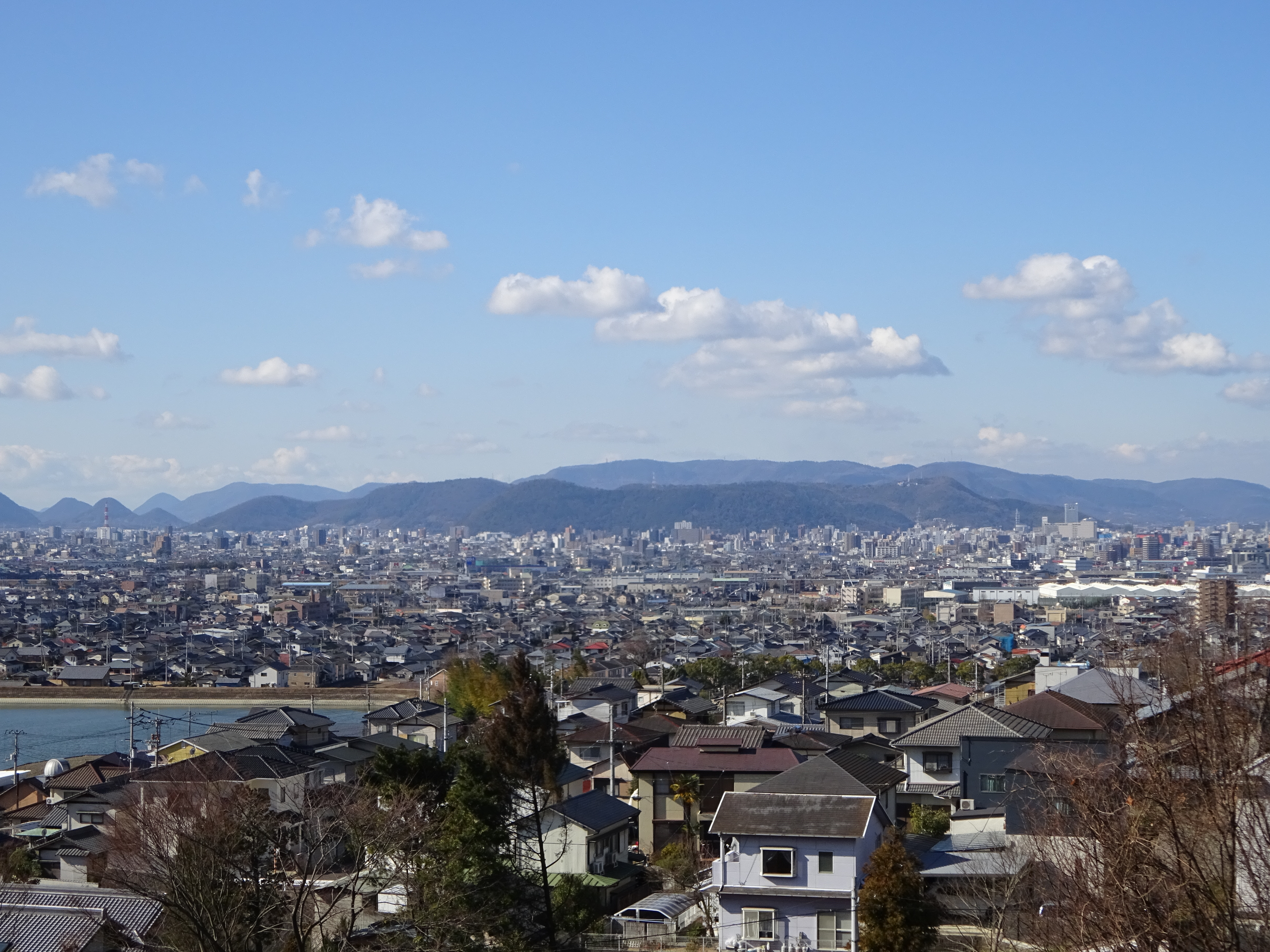 東方の東部公園で、冬季の石清尾山塊を望む